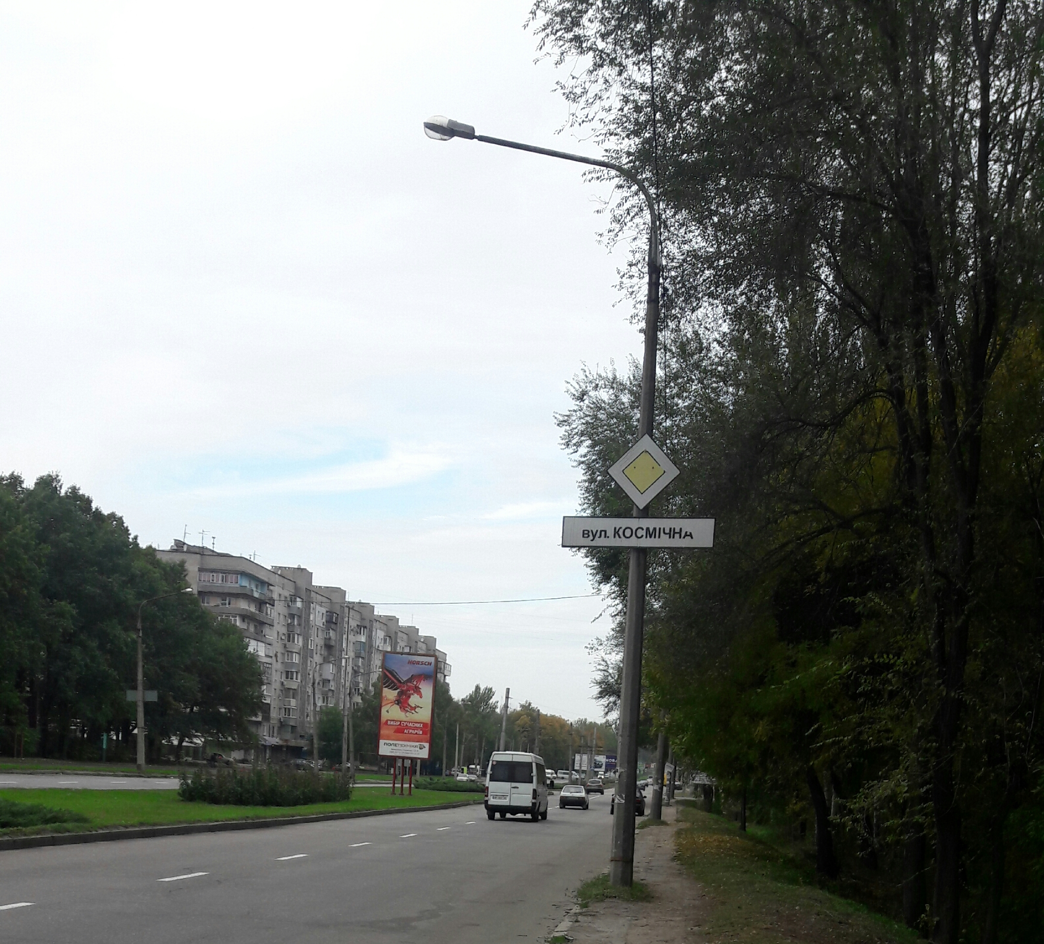 Zaporizhia, Space street